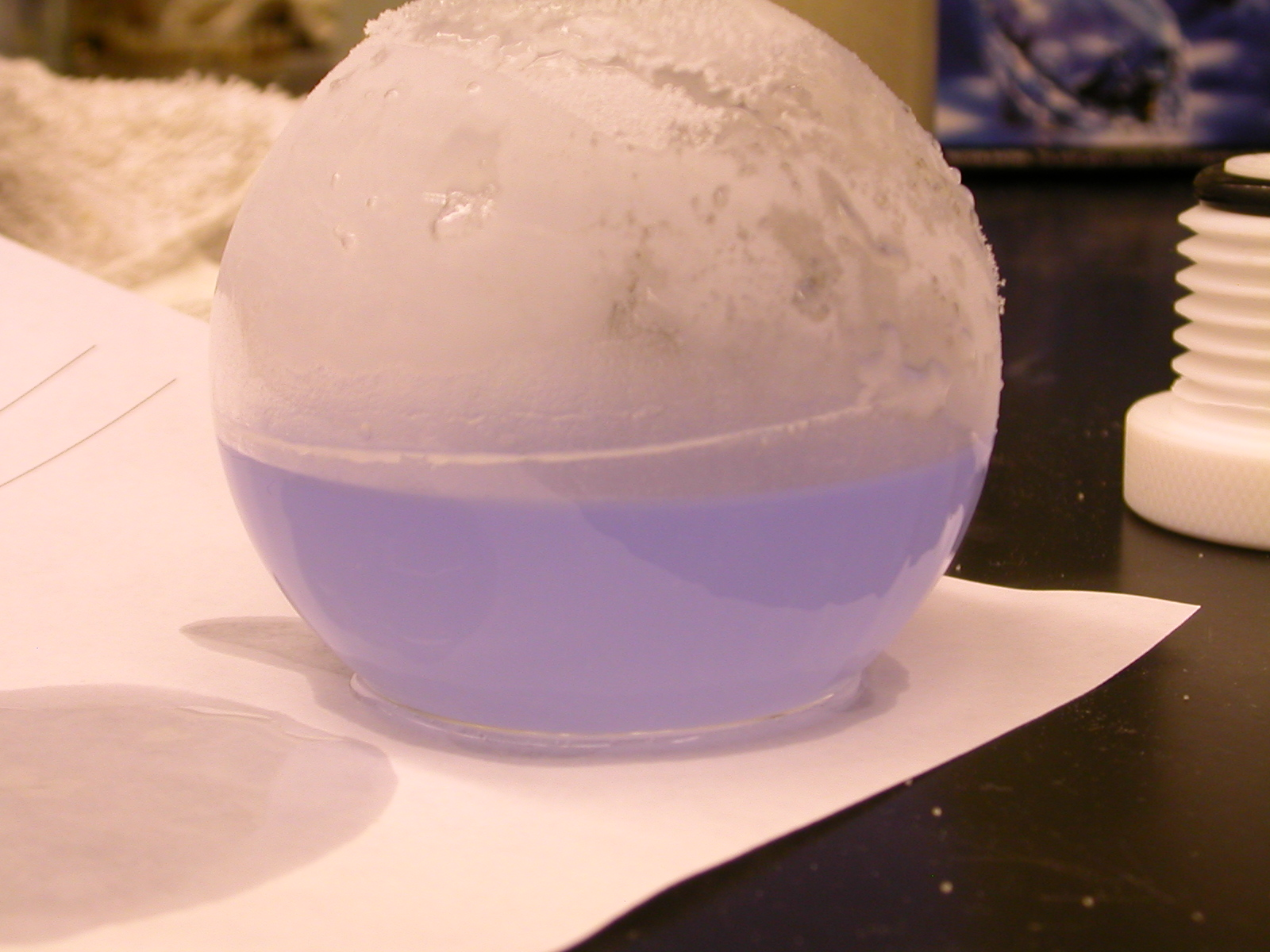 臭氧在二氯甲烷里的溶液